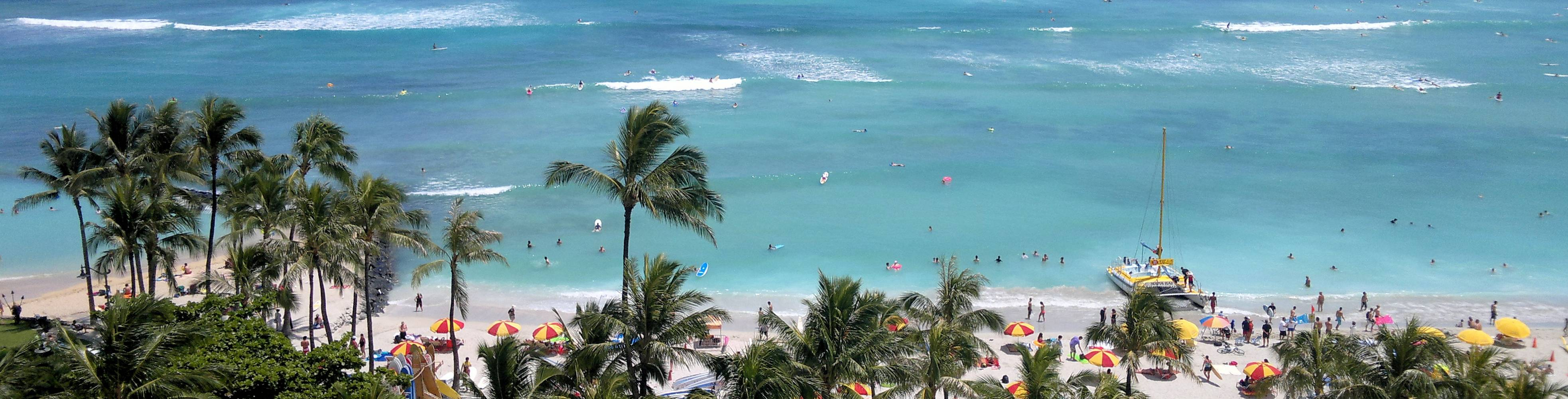 Der Strand von Waikiki